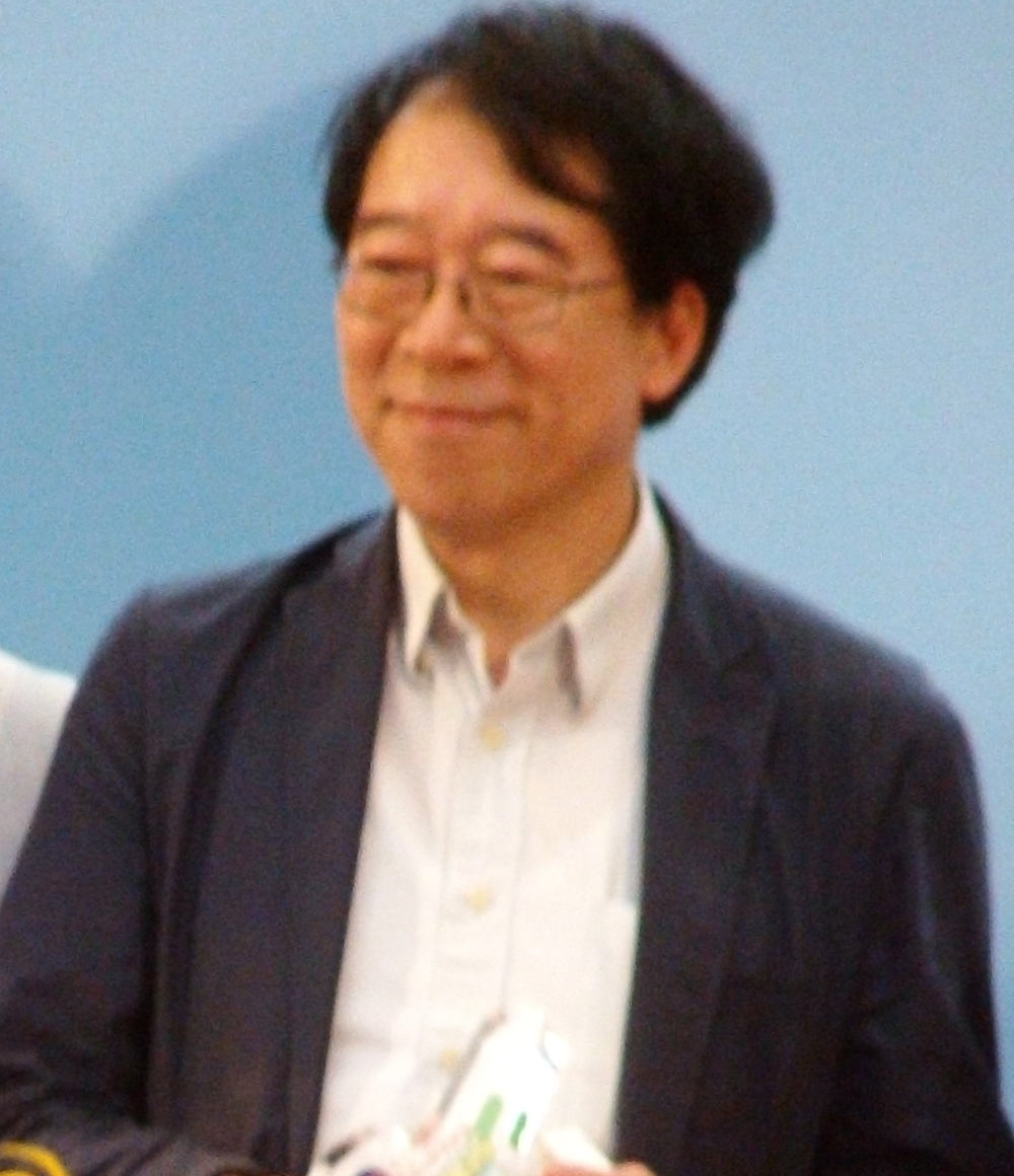 中文（香港）: 香港文化人韋然的樣子